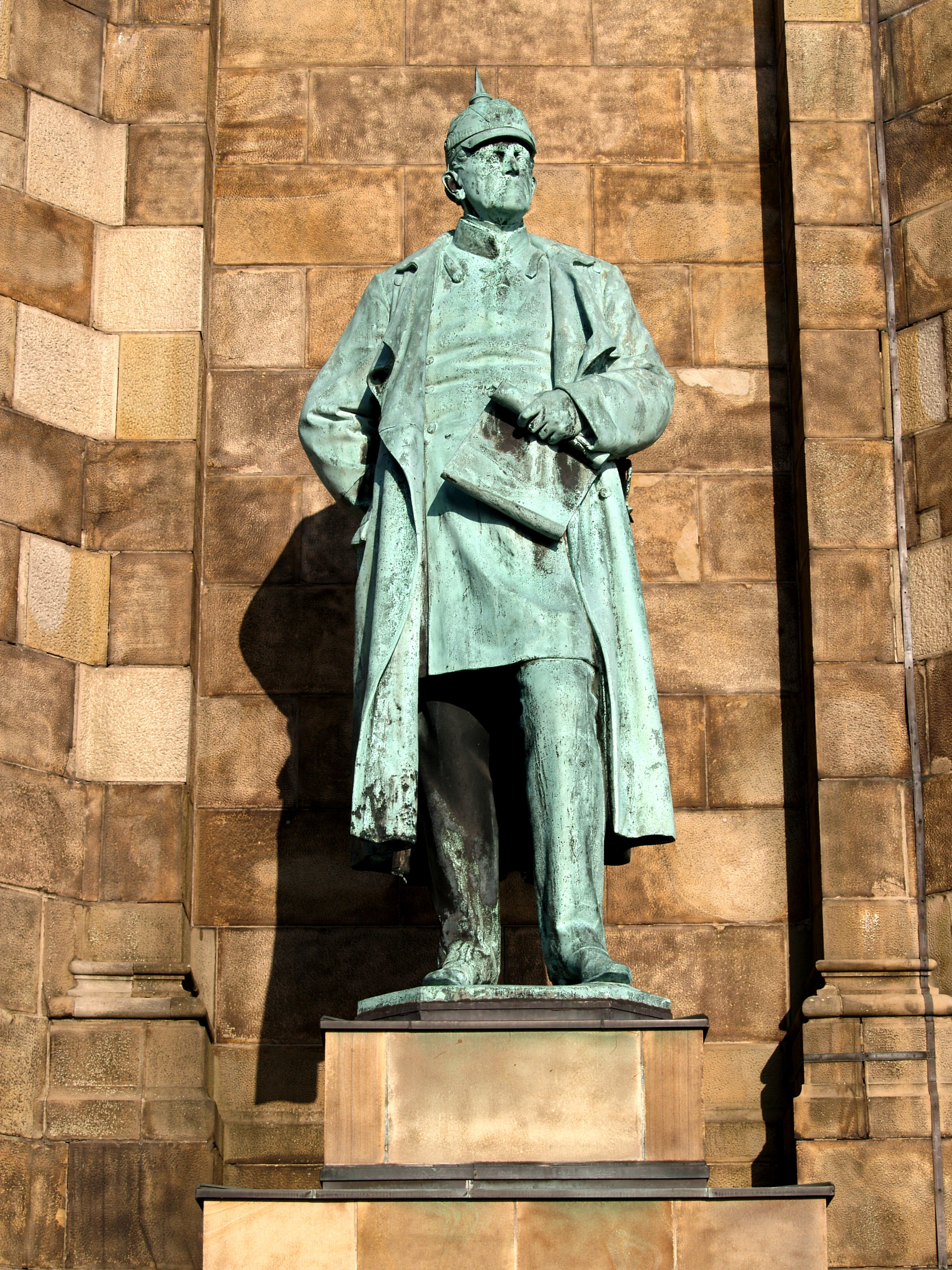 Hohensyburg monument, statue of Moltke